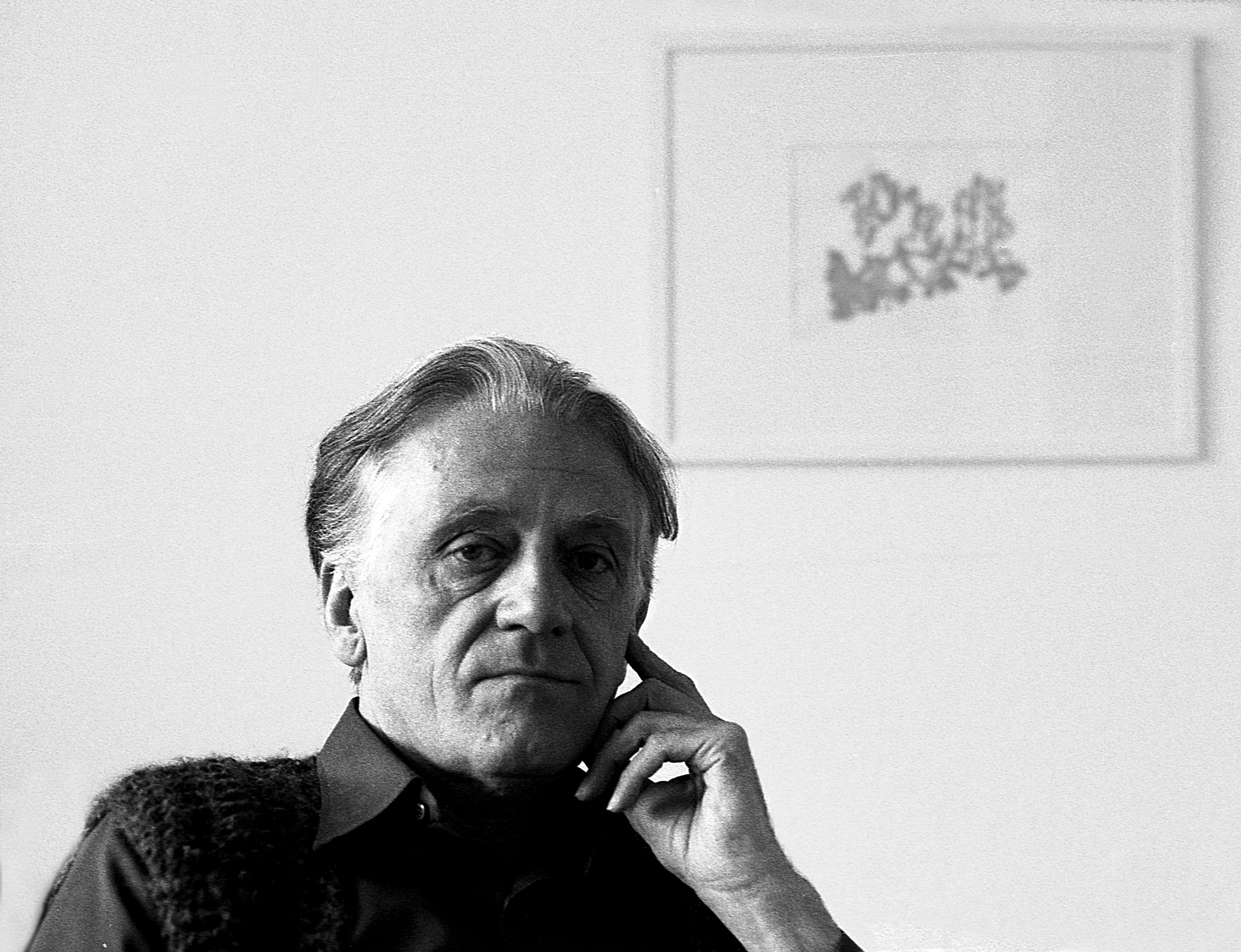 Maler, Schriftsteller